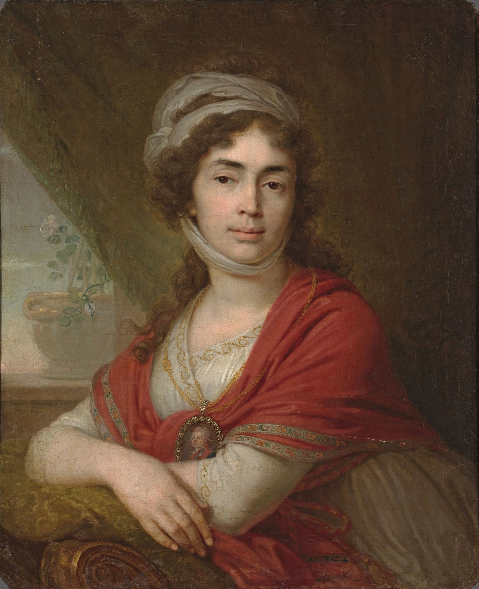 Марфа (Мария) Дмитриевна Дунина (?–1852) – дочь Дмитрия Автономовича Норова (1730–1788), генерал-майора, Слободского украинского губернатора (1755), правителя Харьковского наместничества (1786–1788). Мария (Марфа) Дмитриевна имела брата Александра и двух сестер: Елизавету, замужем за генерал-лейтенантом А.Н.Золотницким, и вторую, Екатерину, замужем за А.М.Донец-Захаржевским. М.Д.Дунина вышла замуж за генерала от кавалерии И.П.Дунина. Изображена с миниатюрным портретом на груди с изображением своего отца Д.А.Норова.